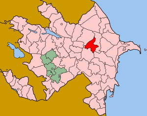 Map of Azerbaijan showing Agsu (Ağsu) rayon.